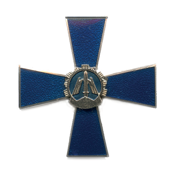 Patteristo sai myös oman joukko-osastoristin 30.11.1979. Sotilasmestari Markus Nurila luonnosteli ristin. Ristin viimeisteli taiteilija Björn Ole Heinonen.